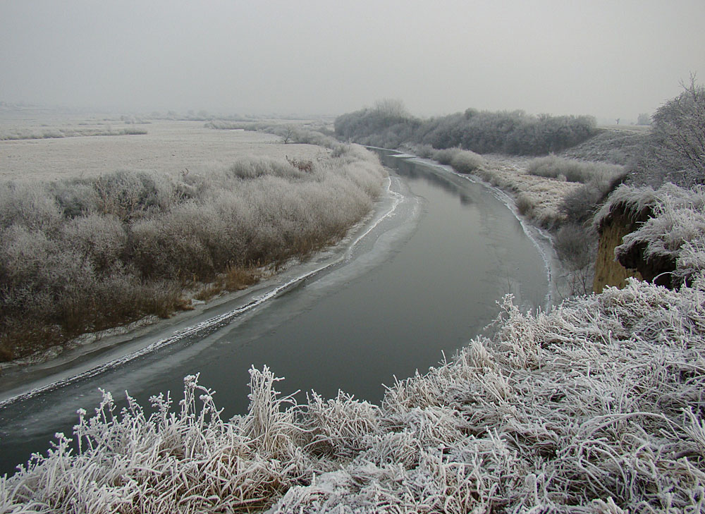 Іній